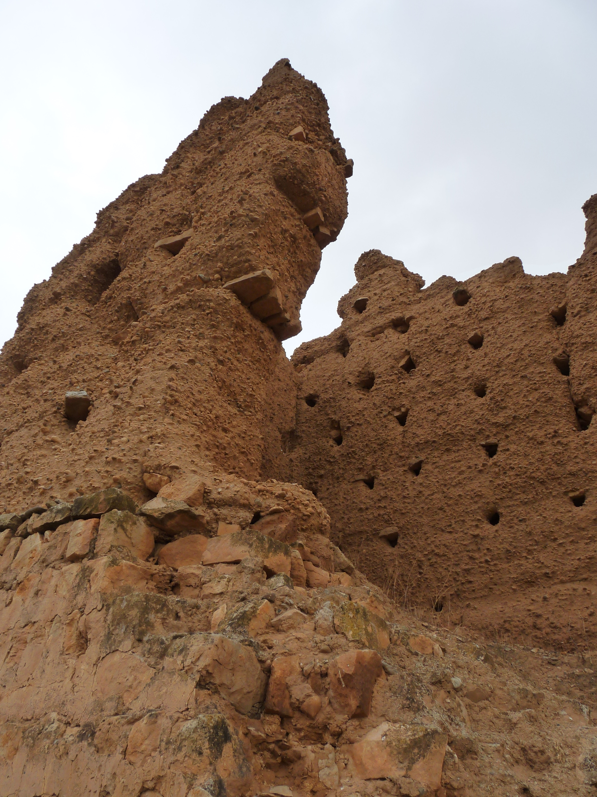 Fraga - Torre de Santa Quiteria (s. XI)